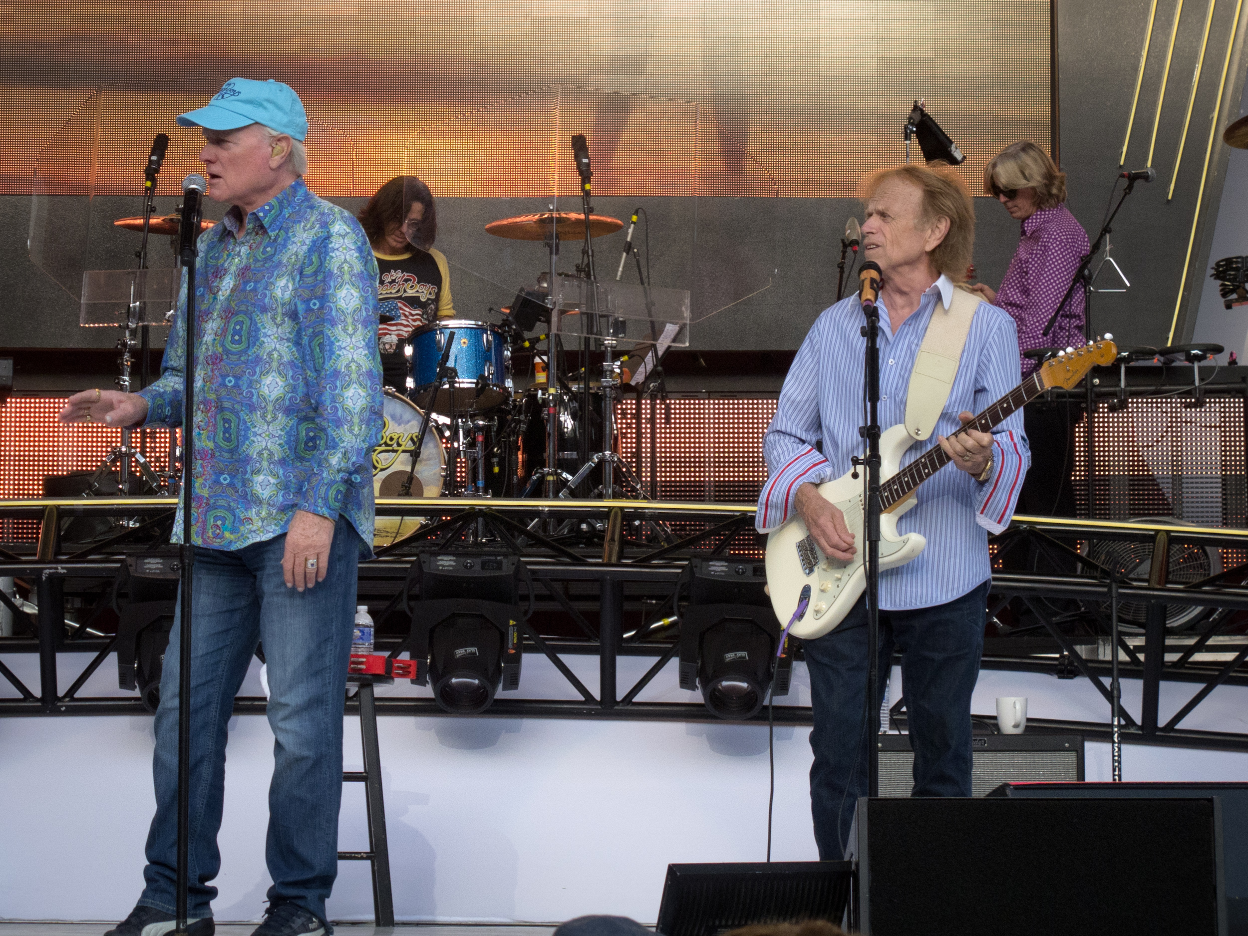 The Beach Boys en su 50 aniversario, Mike Love y Al Jardine.